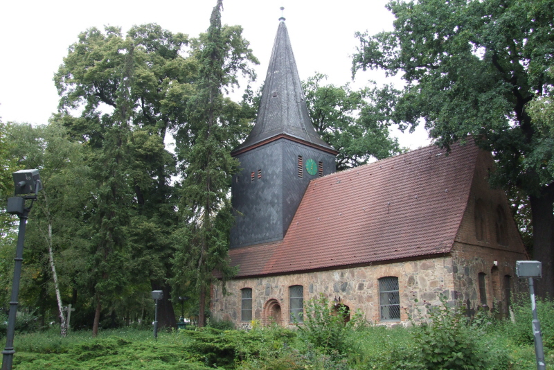 Dorfkirche in Berlin-Wittenau Fotograf: Harald Rossa Datum: August 2006 Höher aufgelöste Version ist verfügbar